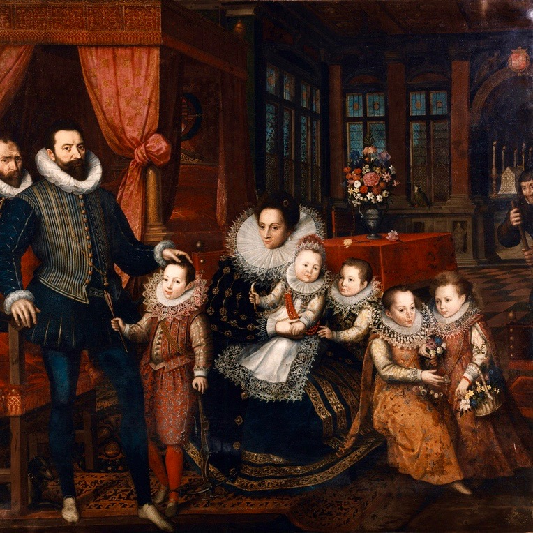 Charles d'Arenberg and Anne de Croy with family by F.Pourbus Jr. (c.1593, Arenbergkasteel) 2